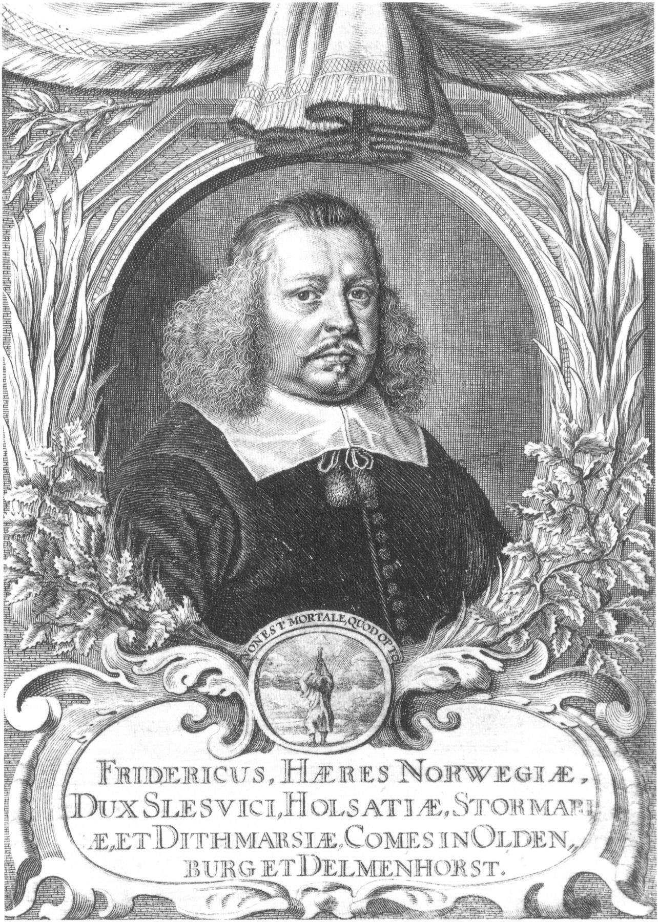 Der Herzog Friedrich III. (Schleswig-Holstein-Gottorf) (1597-1659)